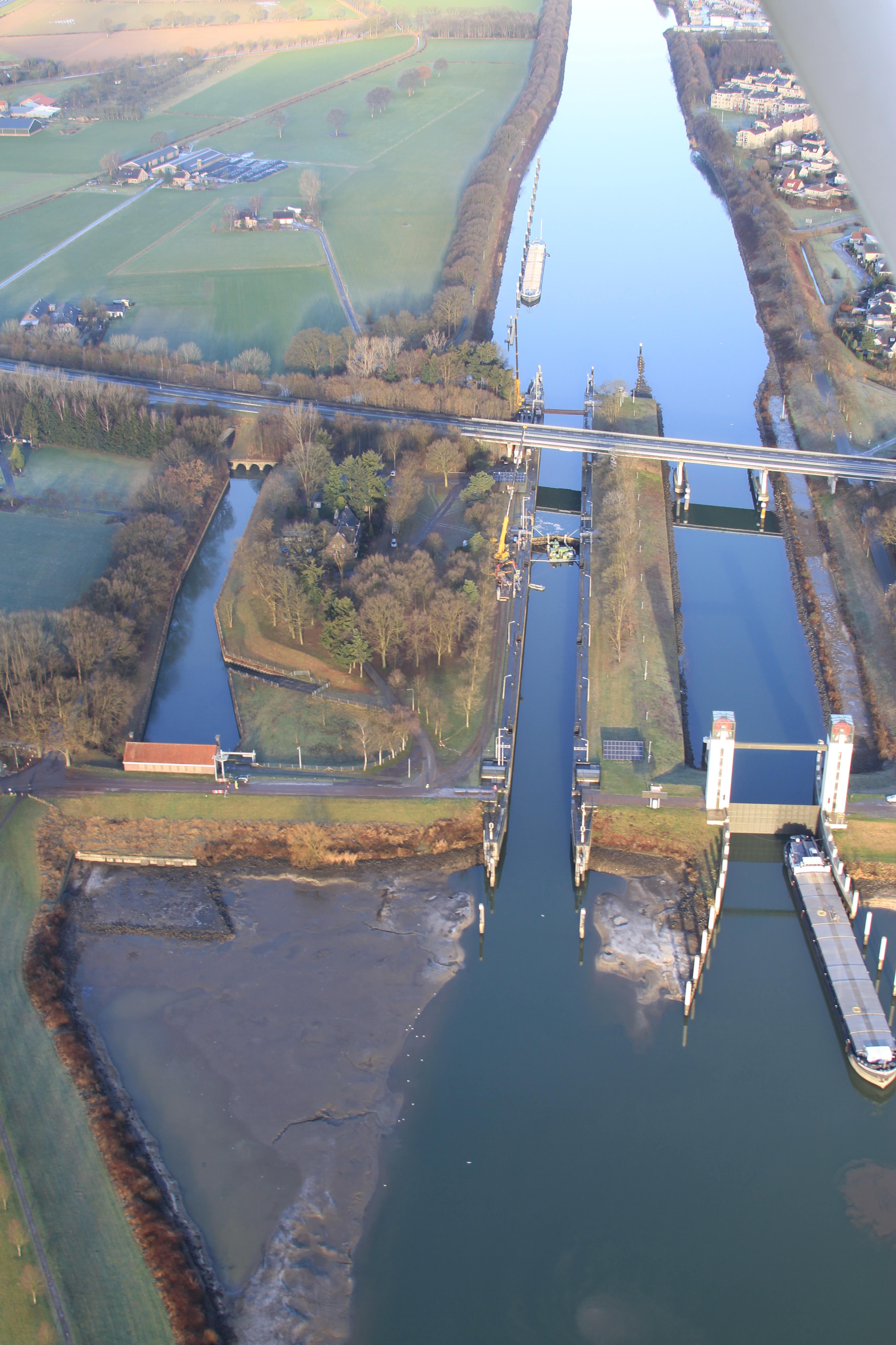 Sluiscomplex Heumen